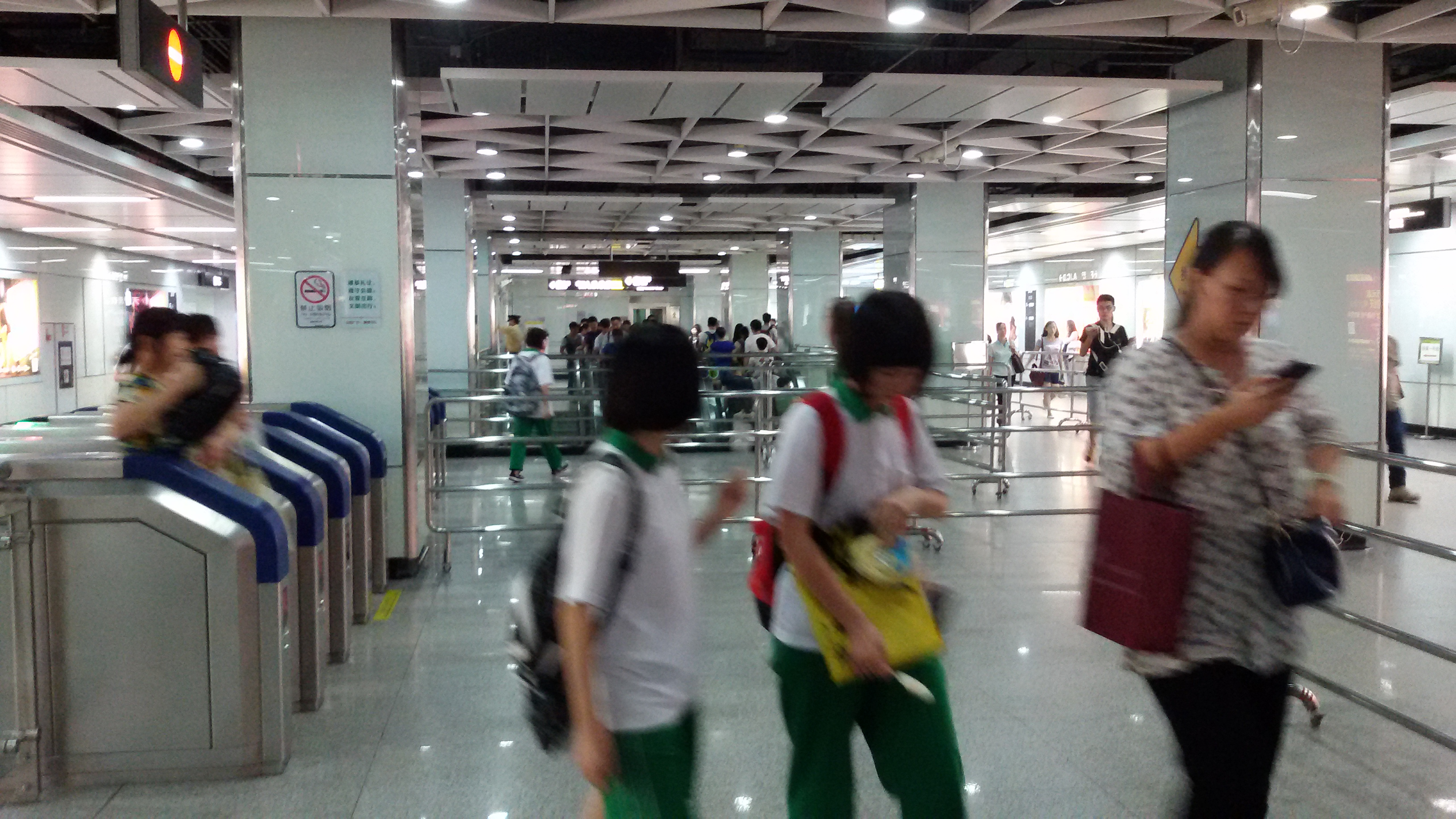 粵語: 楊箕站嘅5號線站廳